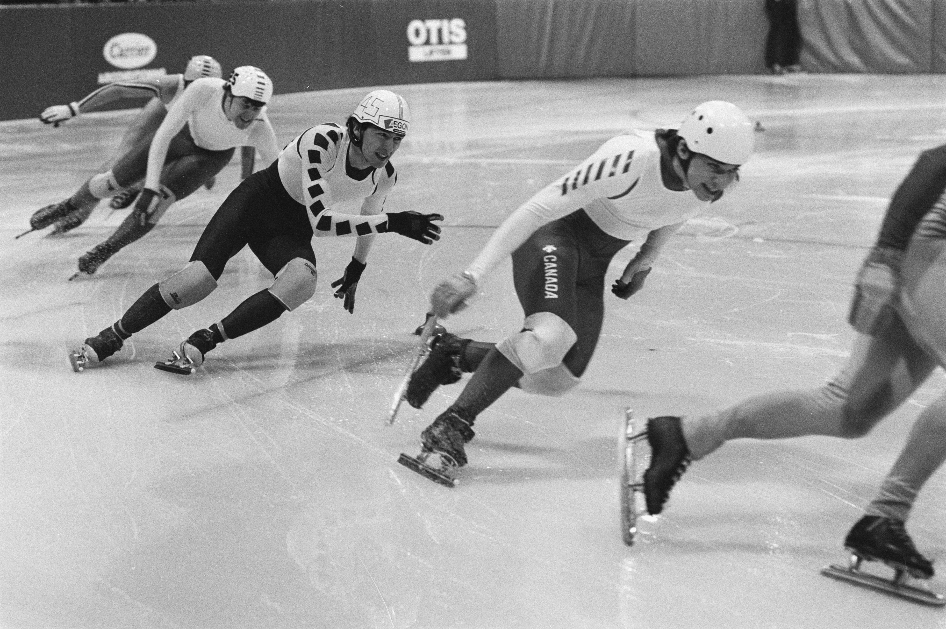 Collectie / Archief : Fotocollectie Anefo Reportage / Serie : [ onbekend ] Beschrijving : WK shorttrack voor dames en heren in de Edenhal in Amsterdam; Nederlands kampioen shorttrack Charles Veldhoven in actie Datum : 16 maart 1985 Locatie : Amsterdam, Noord-Holland Trefwoorden : kampioenen, shorttrack Persoonsnaam : Charles Veldhoven, Edenhal Fotograaf : Croes, Rob C. / Anefo Auteursrechthebbende : Nationaal Archief Materiaalsoort : Negatief (zwart/wit) Nummer archiefinventaris : bekijk toegang 2.24.01.05 Bestanddeelnummer : 933-2679